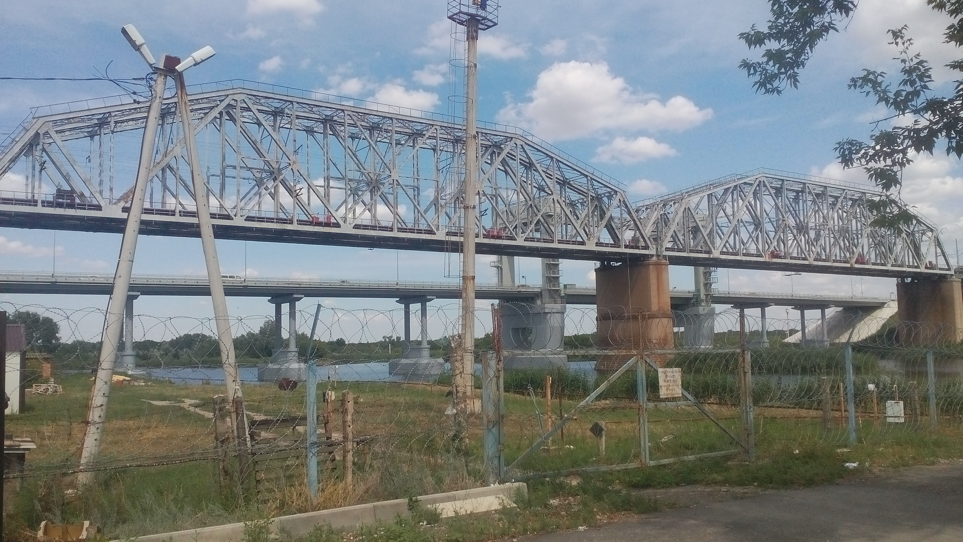 Каменск-Шахтинский, ЖД и автомобильный (бывший гужевой) мосты.